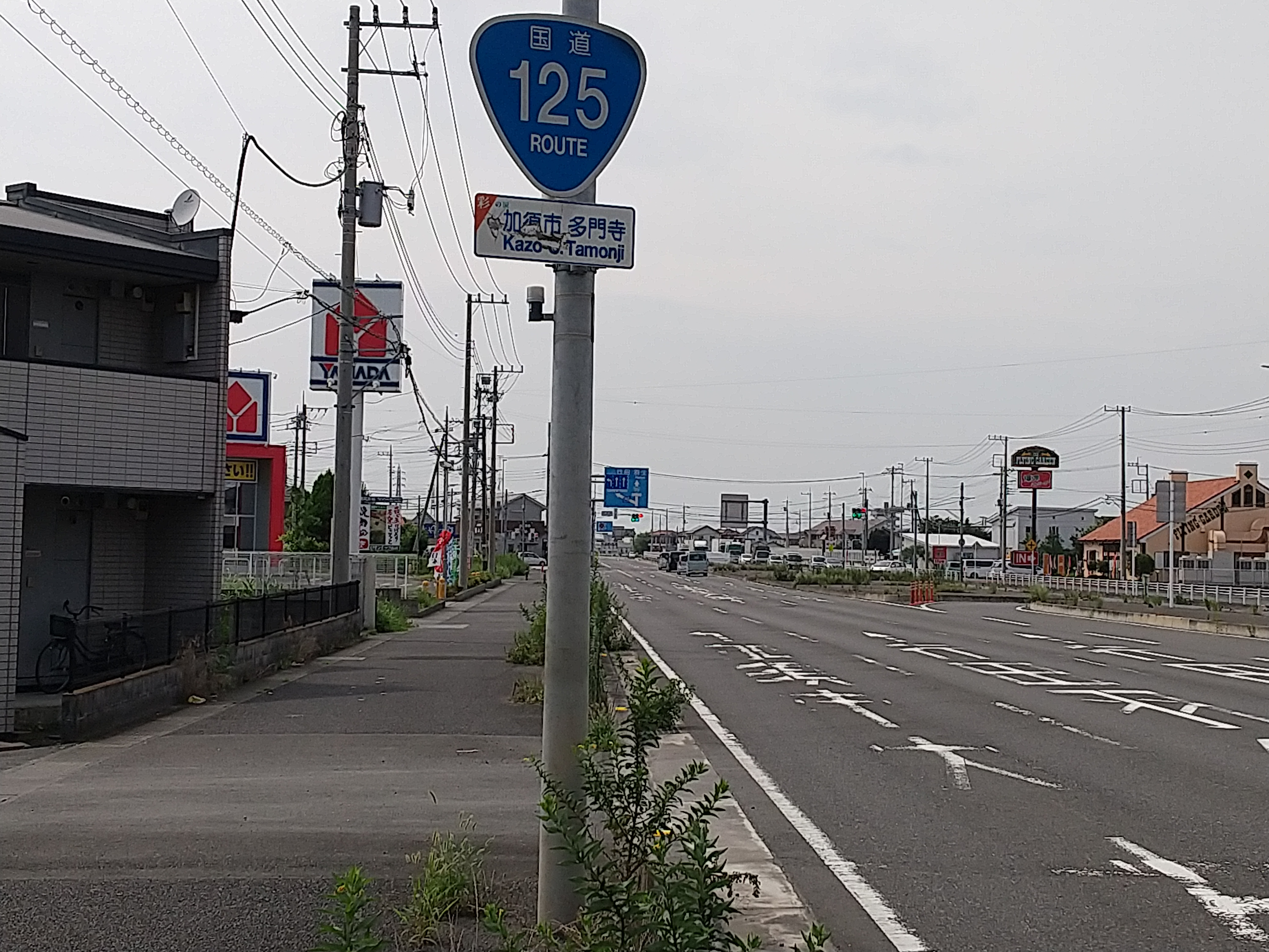 加須市多門寺付近にて